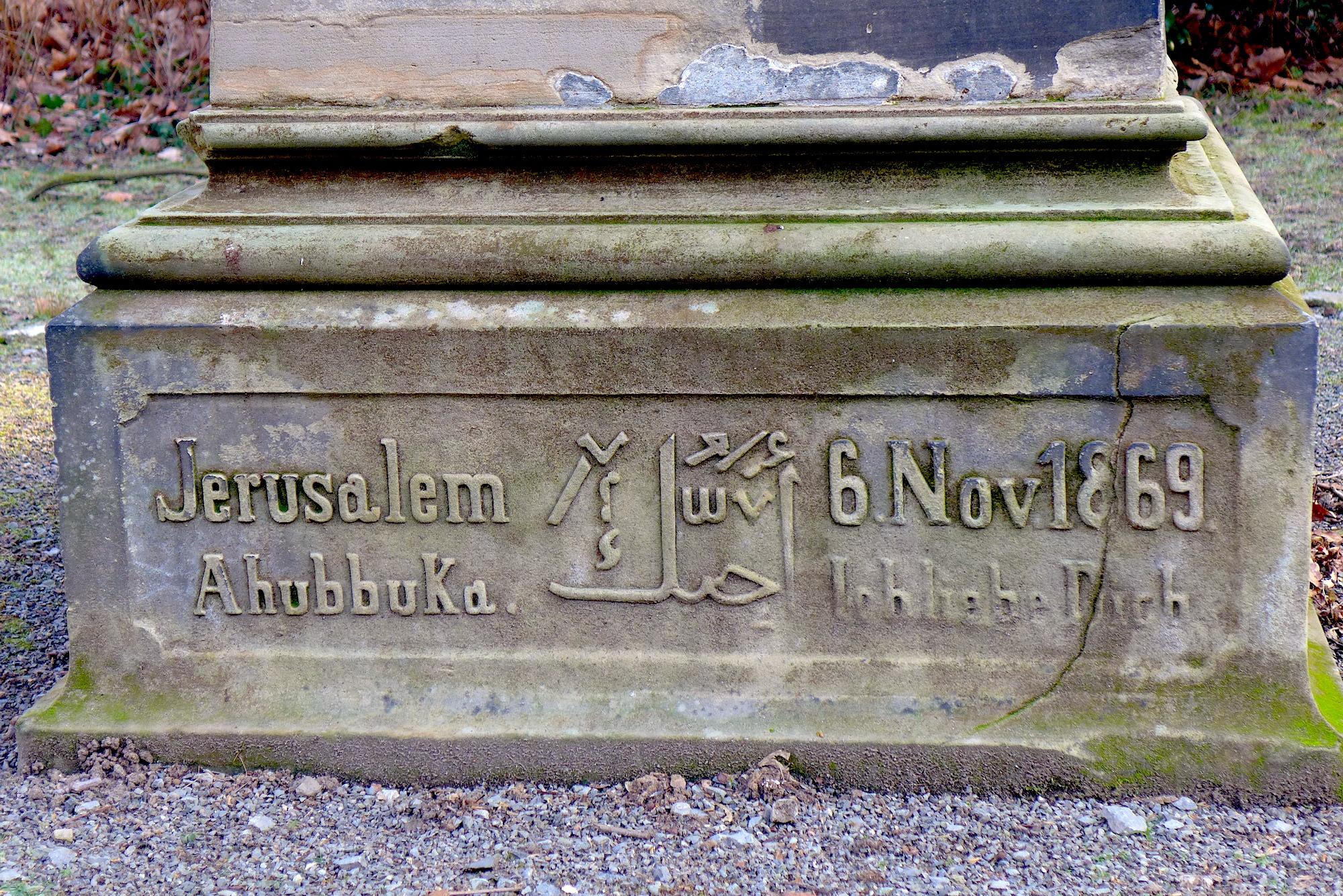 Памятник кронпринцу Фридриху Вильгельму в диаконии Кайзерсверта (Дюссельдорф).